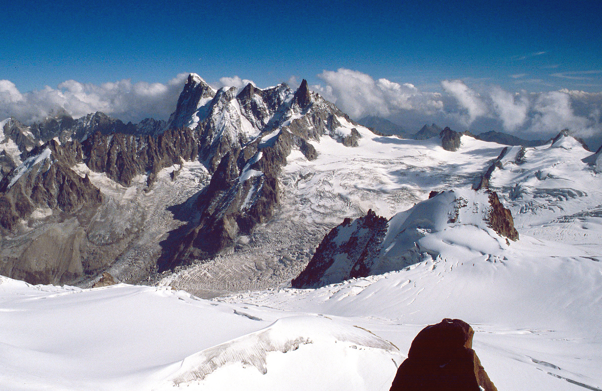 Panorama vom Aiguille du Midi mit: v.l.n.r Grandes Jorasses 4208m, Dome de Rochefort 4015m, Dent du Geant 4013m.